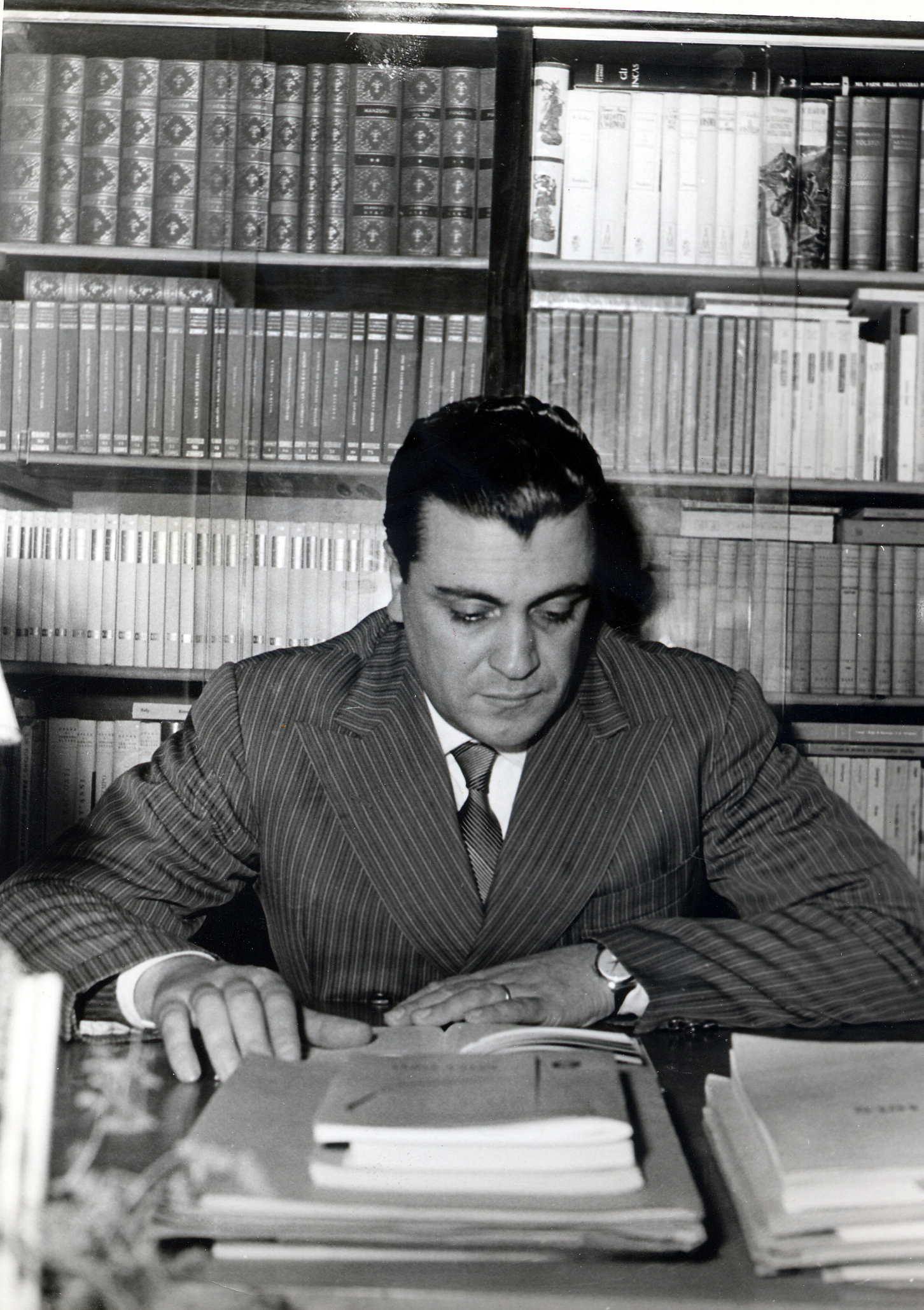 Si tratta di una foto del poeta Antonio Seccareccia nello studio della sua casa di Frascati